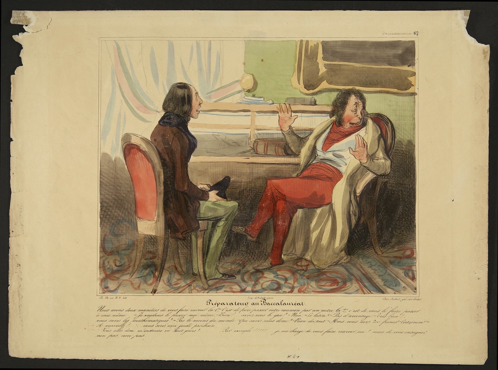 Candidat au baccalauréat interrogeant un préparateur sur le moyen le plus sûr d'obtenir son diplôme